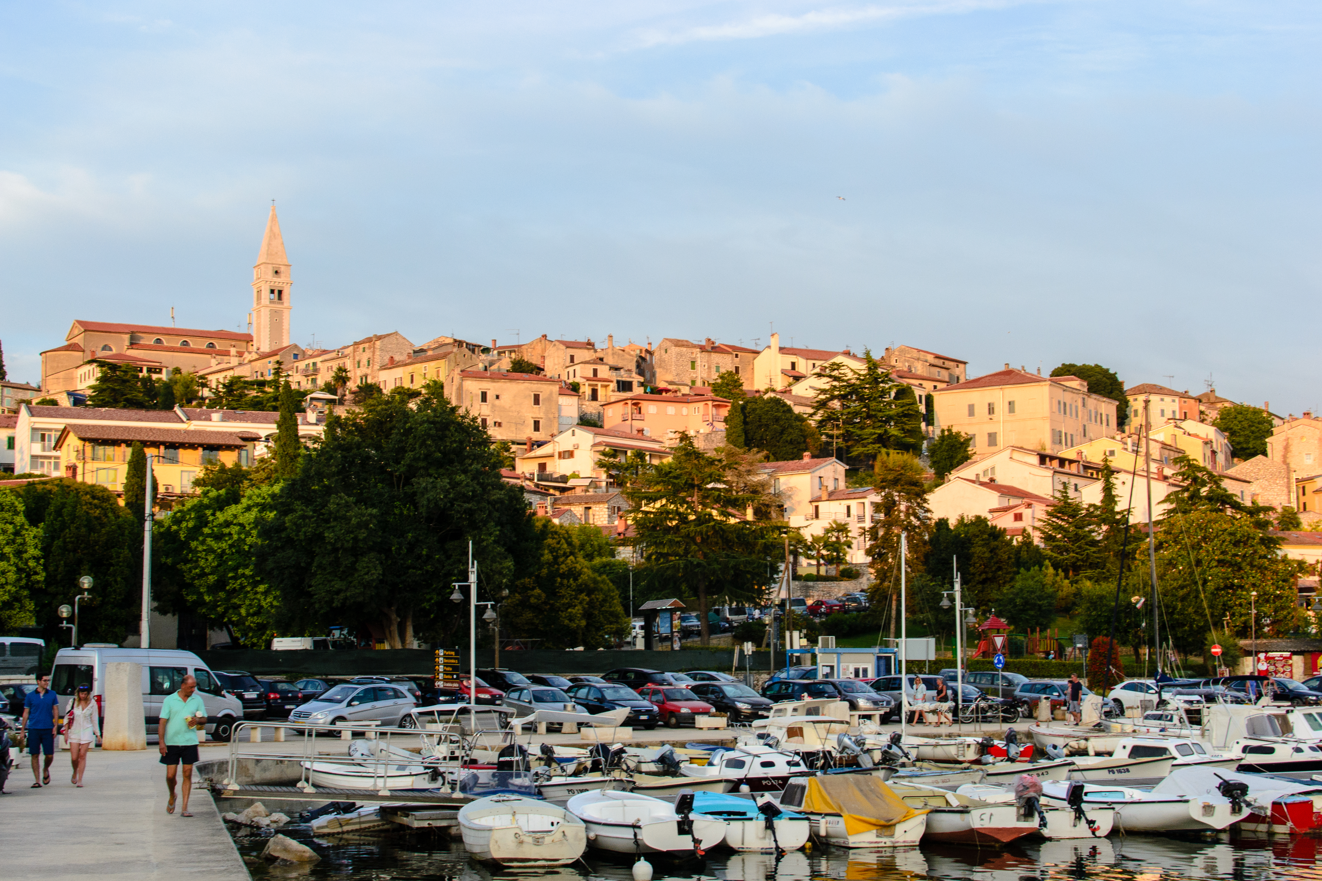 Vrsar